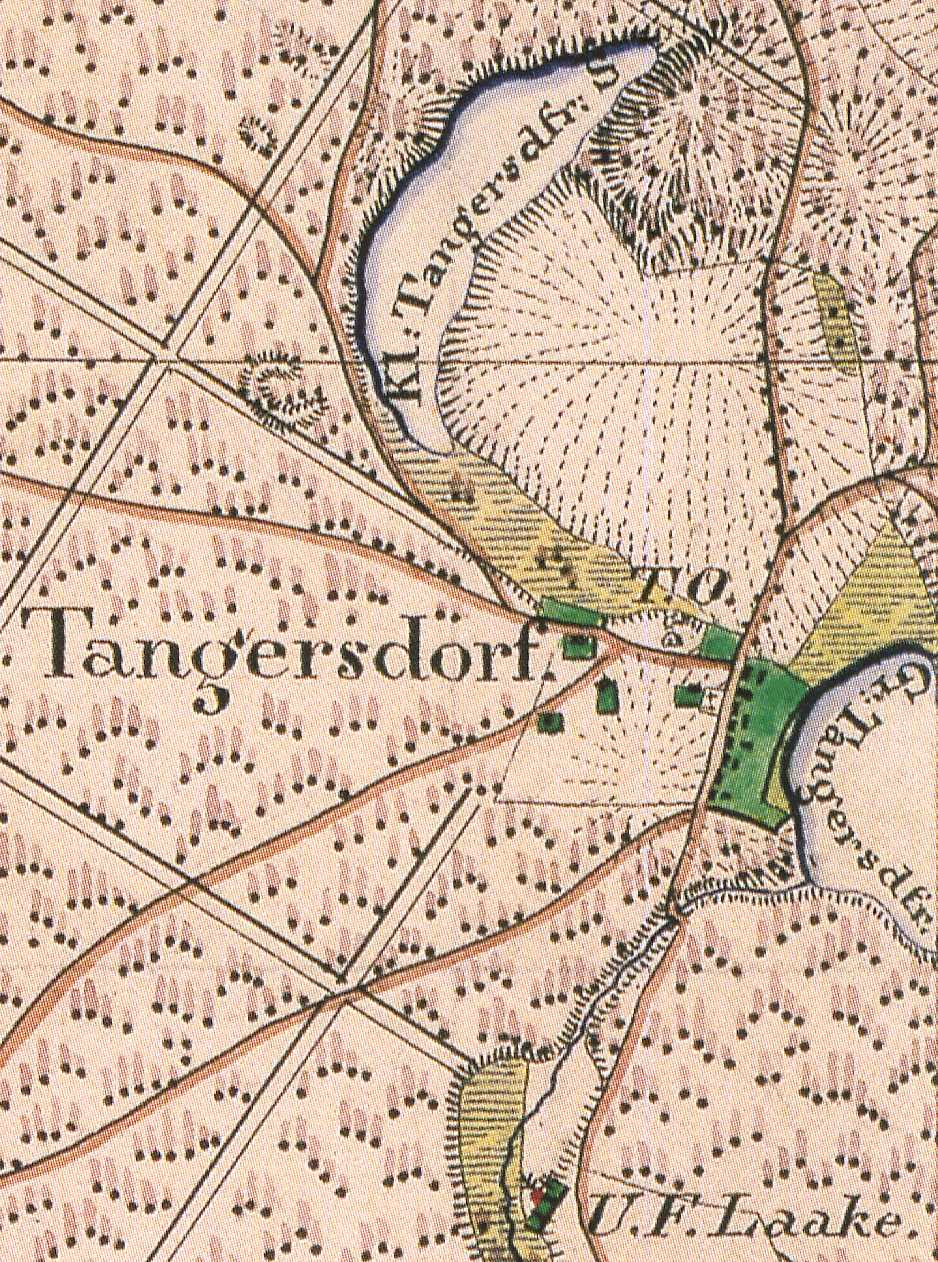 Tangersdorf, Wohnplatz bei Lychen, Lkr. Uckermark, Brandenburg, Ausschnitt aus dem Urmesstischblatt Blatt 2845 Bredereiche von 1825